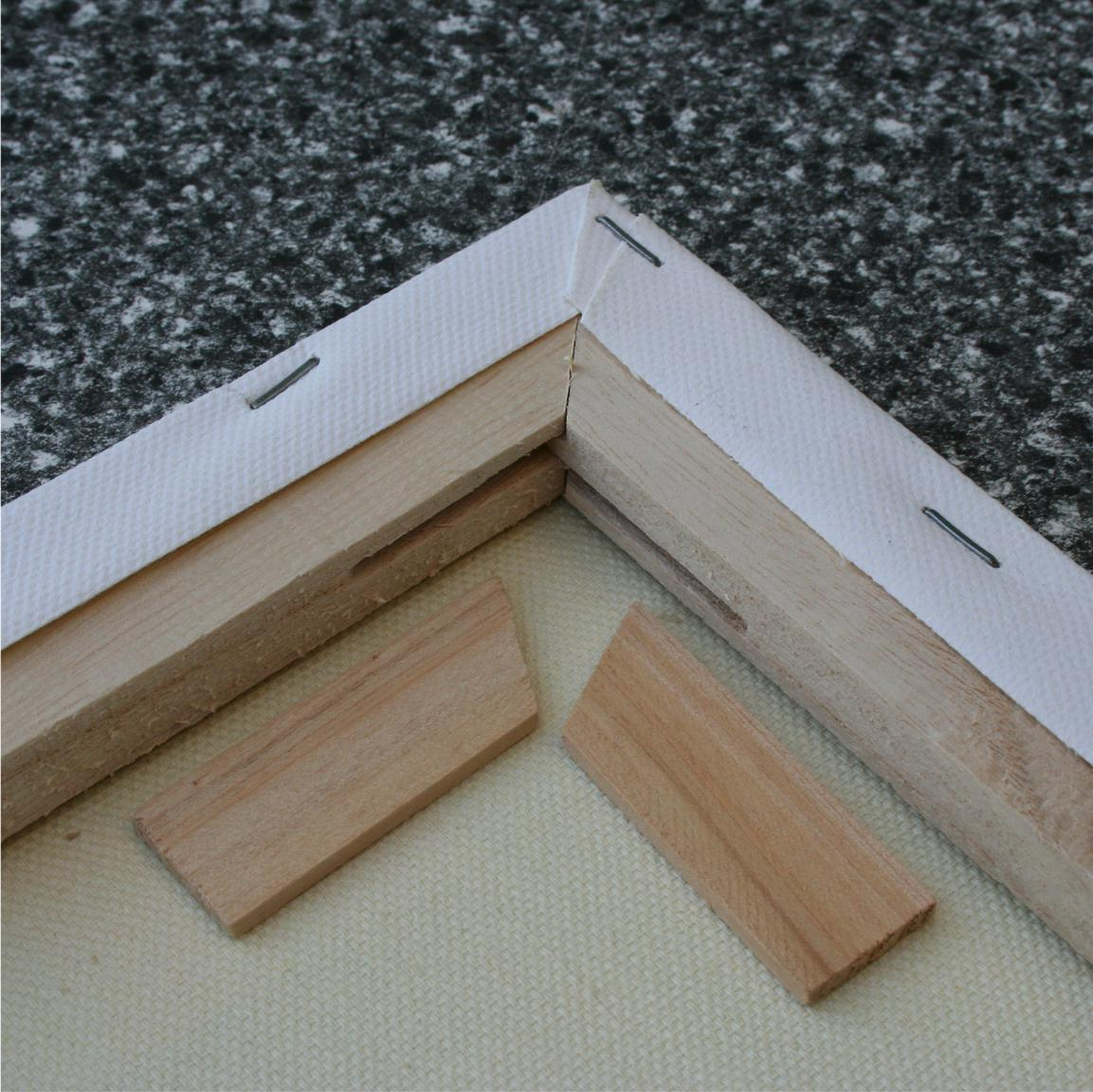 Keilrahmen spannen1